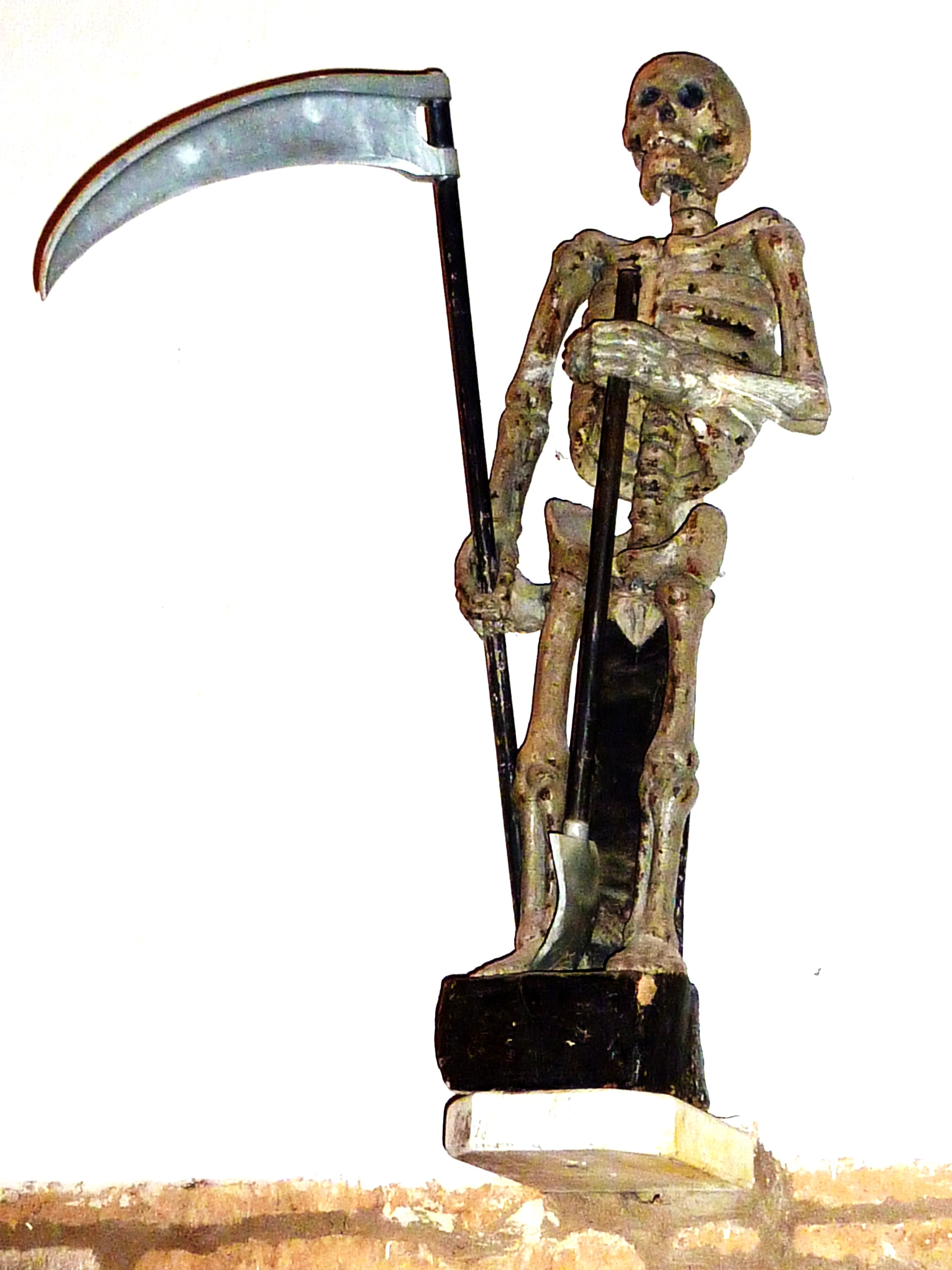 Ploumilliau, église paroissiale Saint-Milliau : l'Ankou (statue en bois peint, représentation de la mort en Bretagne , représenté ici avec sa faux et sa pelle de fossoyeur (non daté, XVIIe ?)